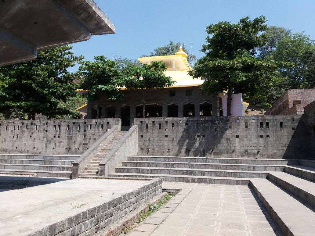 म्हस्वेश्वर मंदिर खारावडे